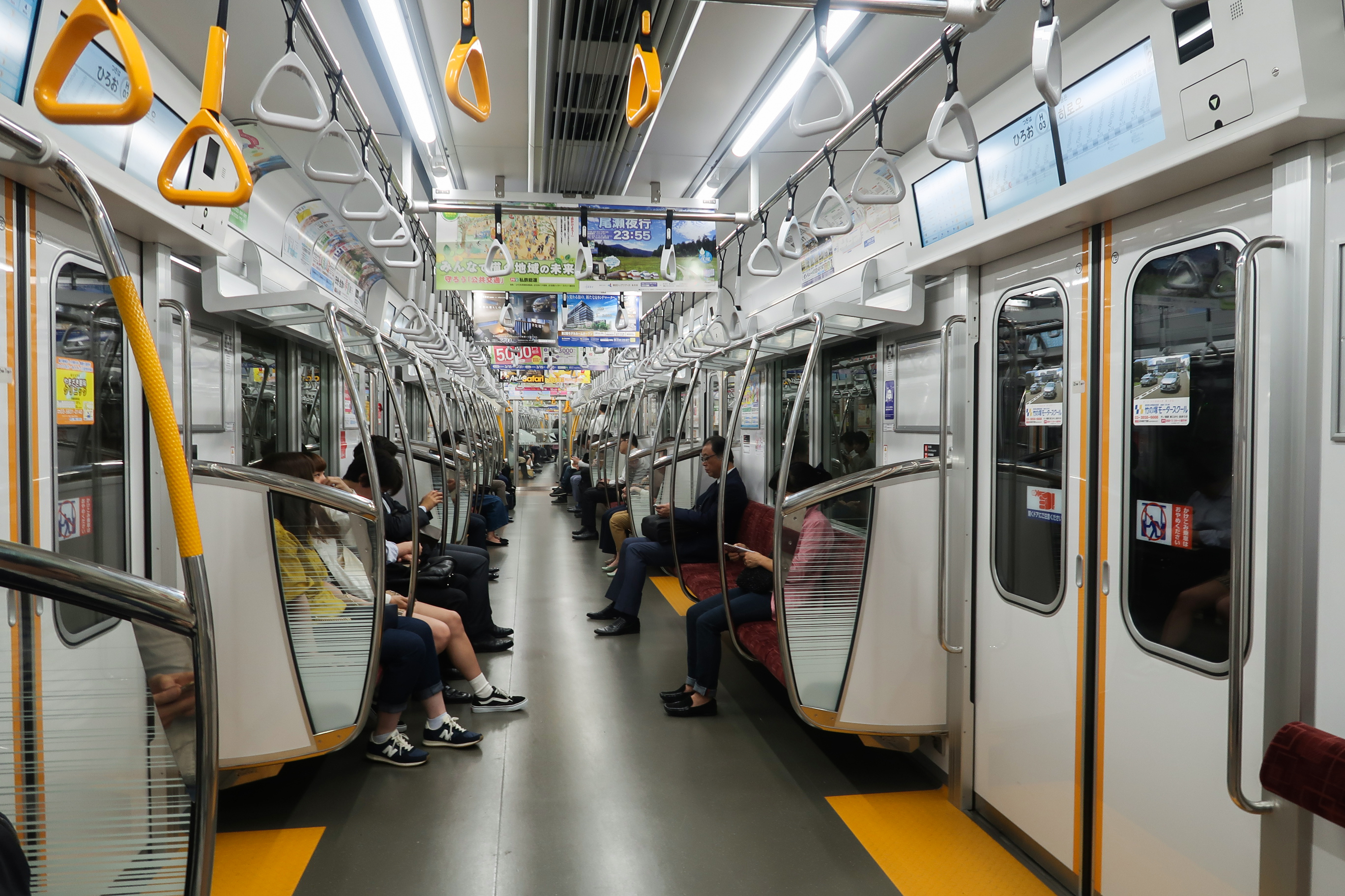 Tobu 70000 series.